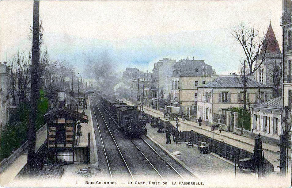 Bois-Colombes - La gare, prise de la passerelle.